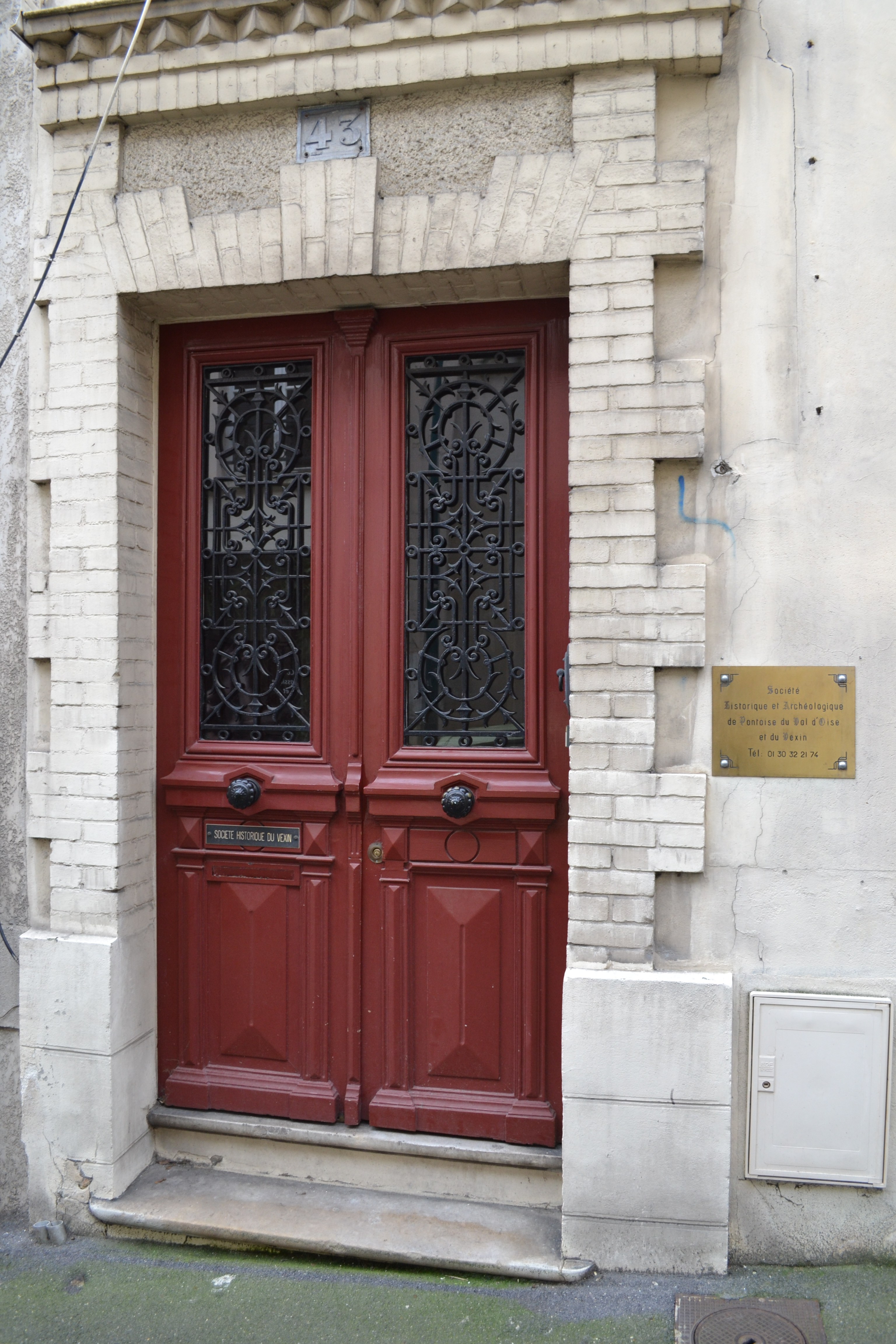 Siège de la Société historique et archéologique de Pontoise, du Val-d'Oise et du Vexin